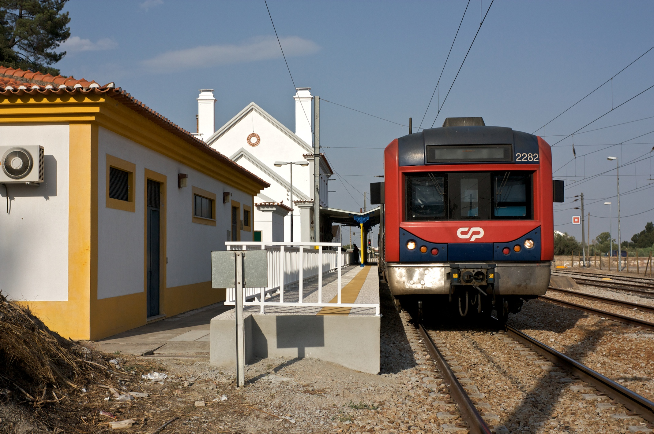 Tipo: Comboio Regional 4908 [Coruche - Setil] Local: Estação de Coruche [Linha de Vendas Novas, PK 31] Data e hora: 8 de Setembro de 2009 [17h35] Material: Automotora 2282 [Unidade Tripla Eléctrica]